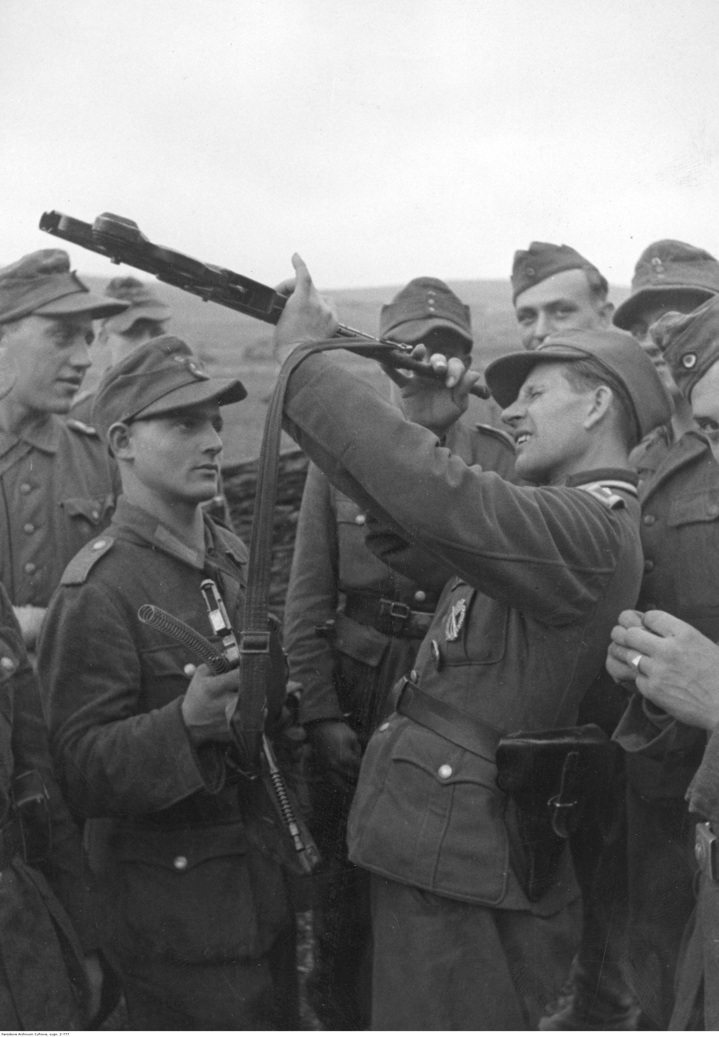 Ćwiczenia z bronią na zapleczu frontu w Galicji. Rusznikarz w otoczeniu żołnierzy sprawdza przewód lufy karabinka Sturmgewehr Stg.44. Obok żołnierz trzymający pozostałe części broni, m.in. sprężynę powrotna.